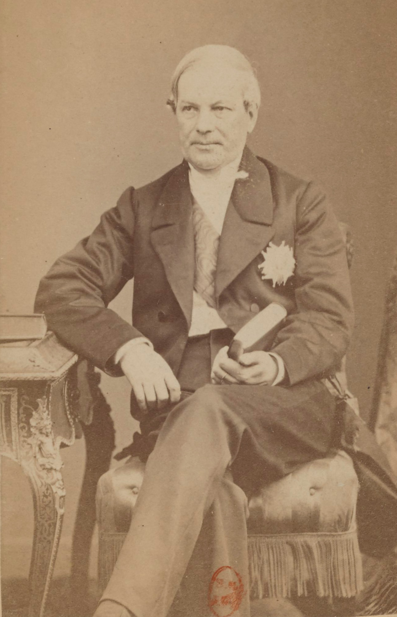 Pierre Magne, photographie de Disdéri.